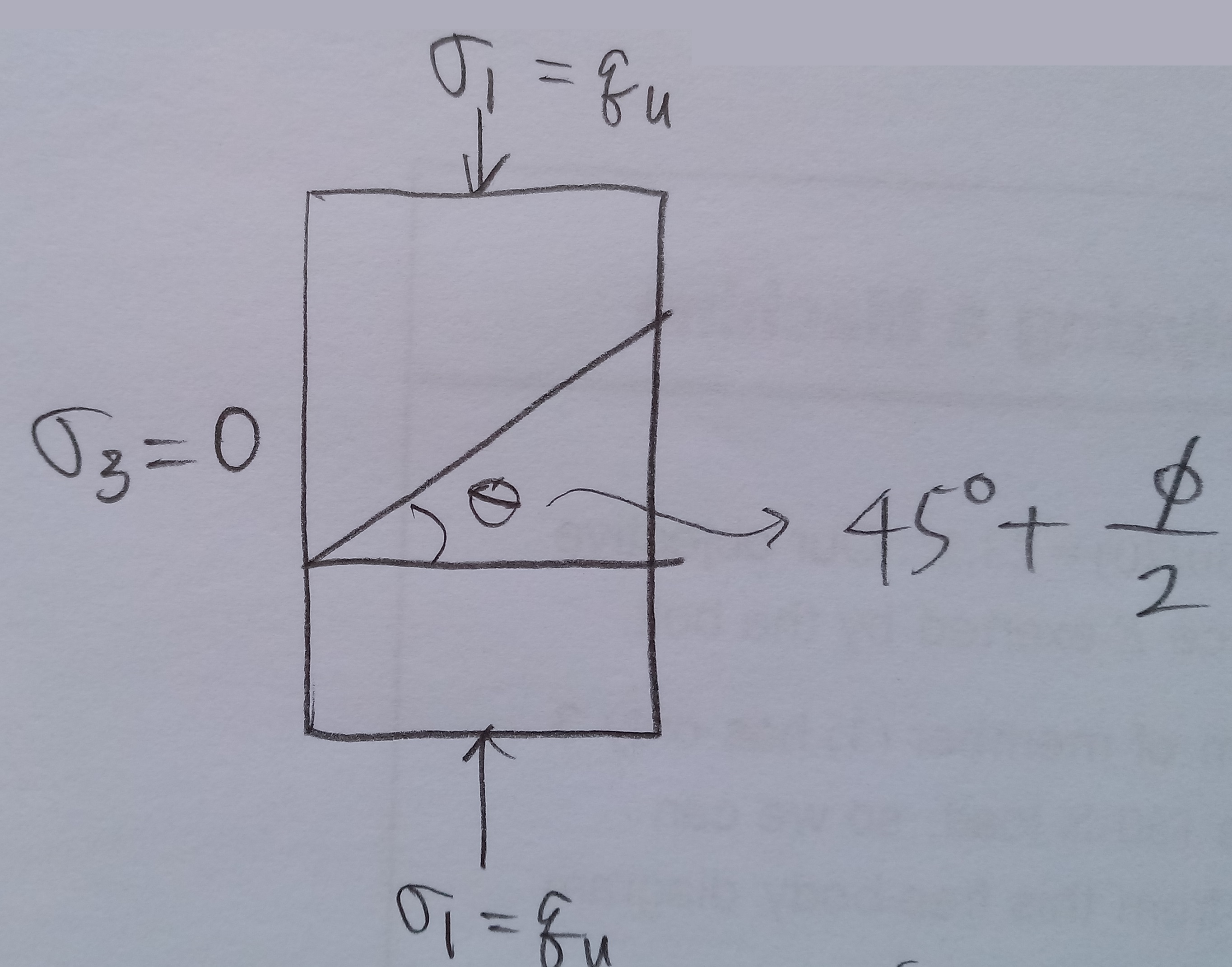 흙 시료의 전단 강도 시험 중 일축 압축 시험